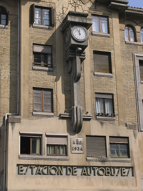 Photo: B. García S.